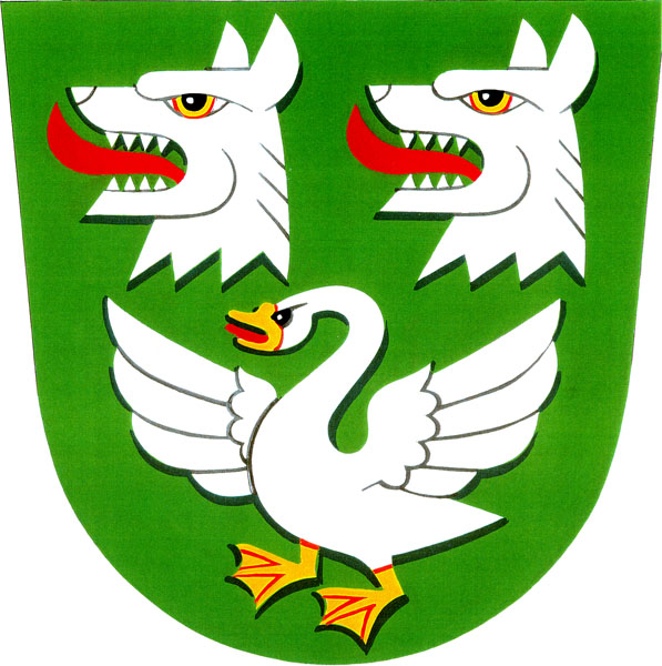 Znak obce Uhřice (okres Kroměříž)